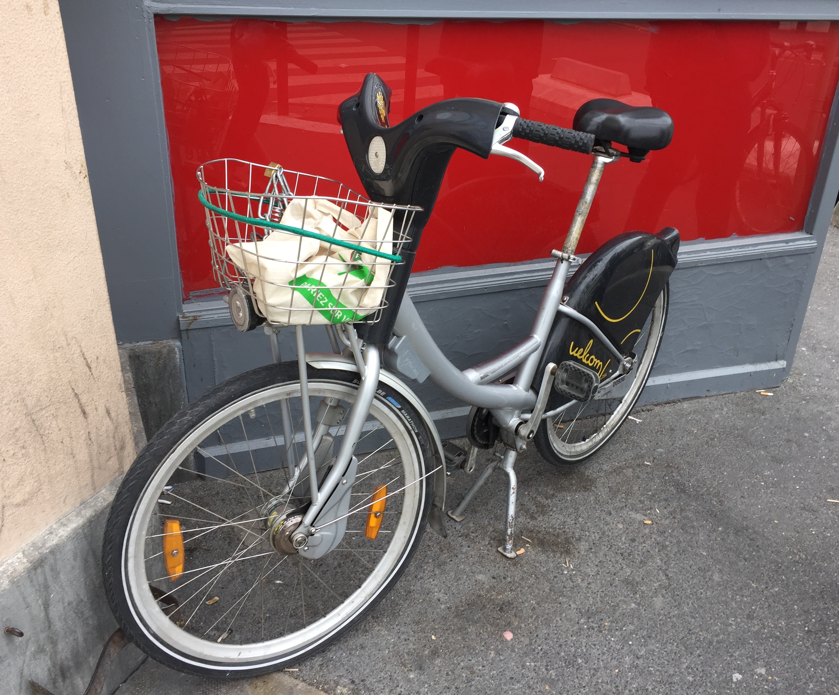 Un ancien vélo en libre service Velcom "privatisé" localisé en octobre 2018 à Pierrefitte-sur-Seine.